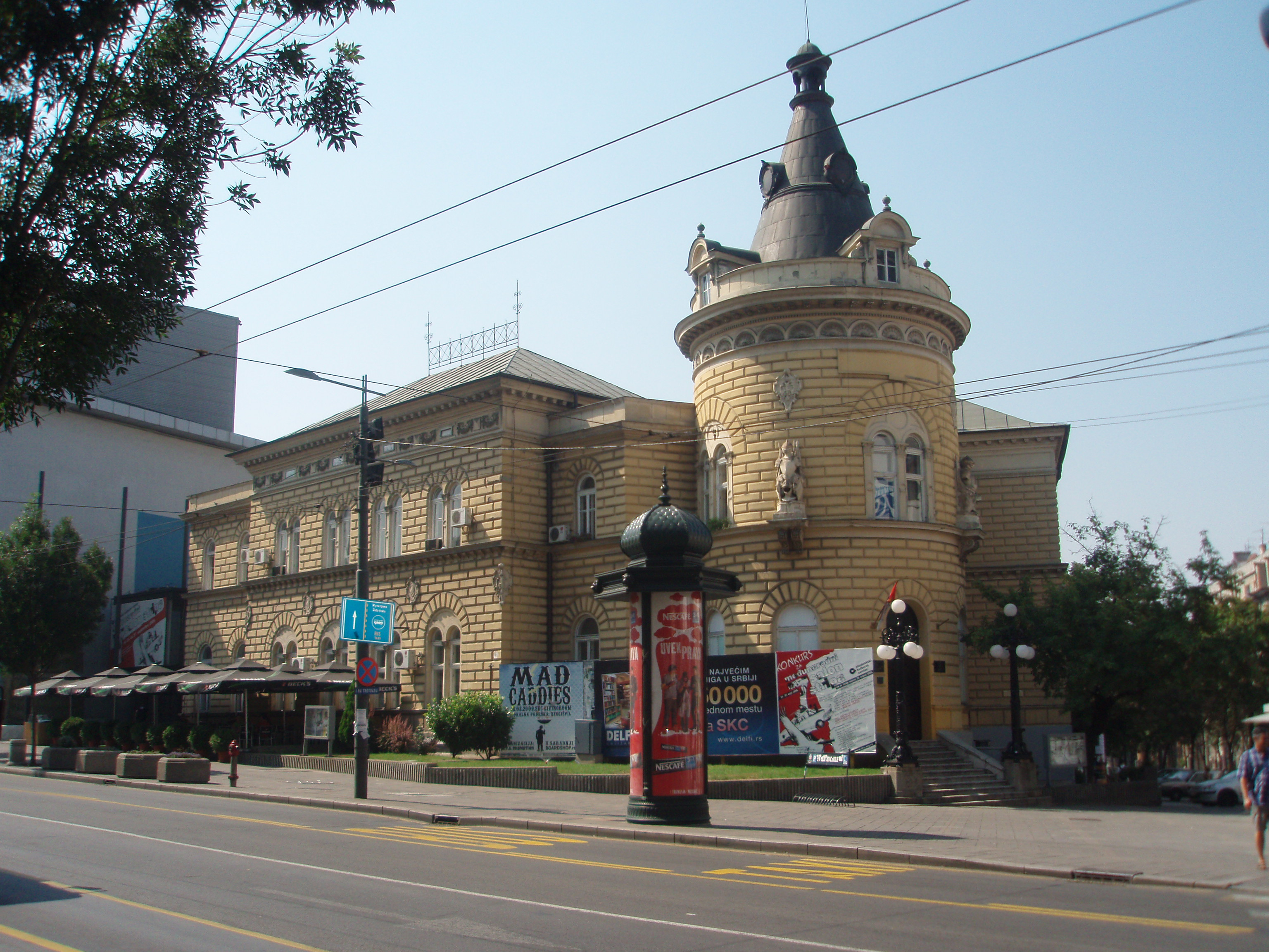 Oficirski dom